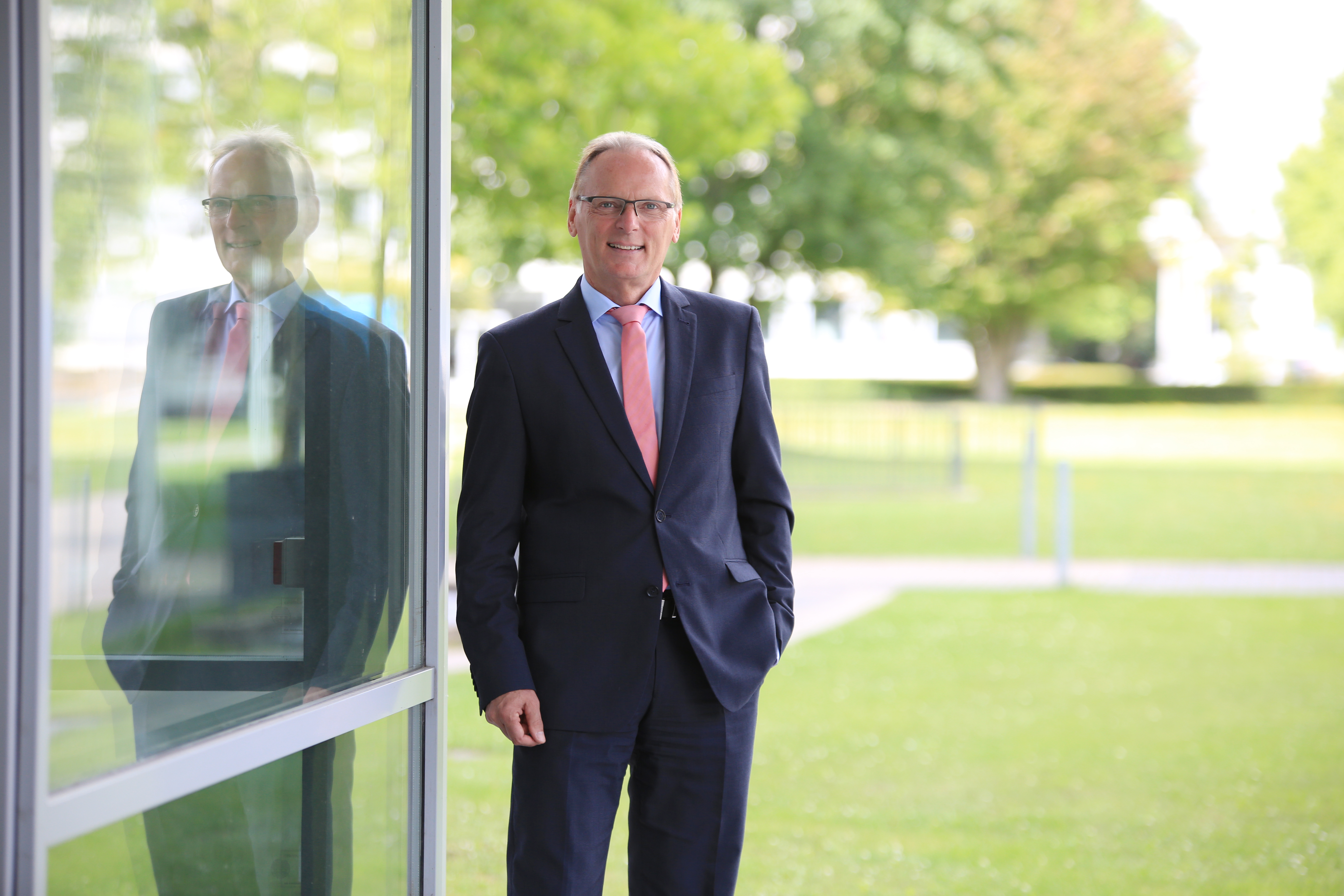 Jochen Homann, Eingang BNetzA